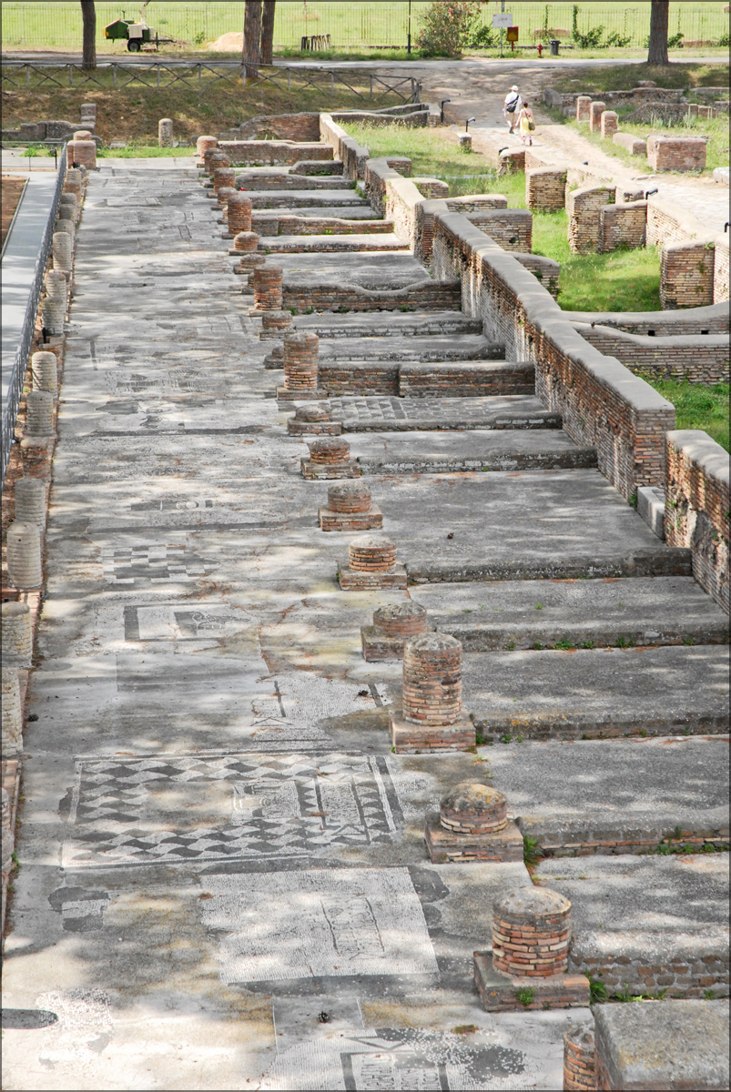 Les emplacements des bureaux sur la place des corporations La place des corporations, située à proximité du théâtre, était entourée d'un portique sous lequel se trouvaient 70 bureaux des sociétés (armateurs, commerçants) qui faisaient des affaires à Ostie. Des mosaïques placées devant chaque bureau servaient d'enseignes (Ier siècle). Au centre de la place, se trouvait un temple attribué à Cérès, déesse de l'agriculture et des moissons.